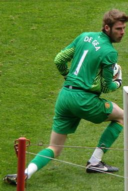 David de Gea jugando con el Manchester United.